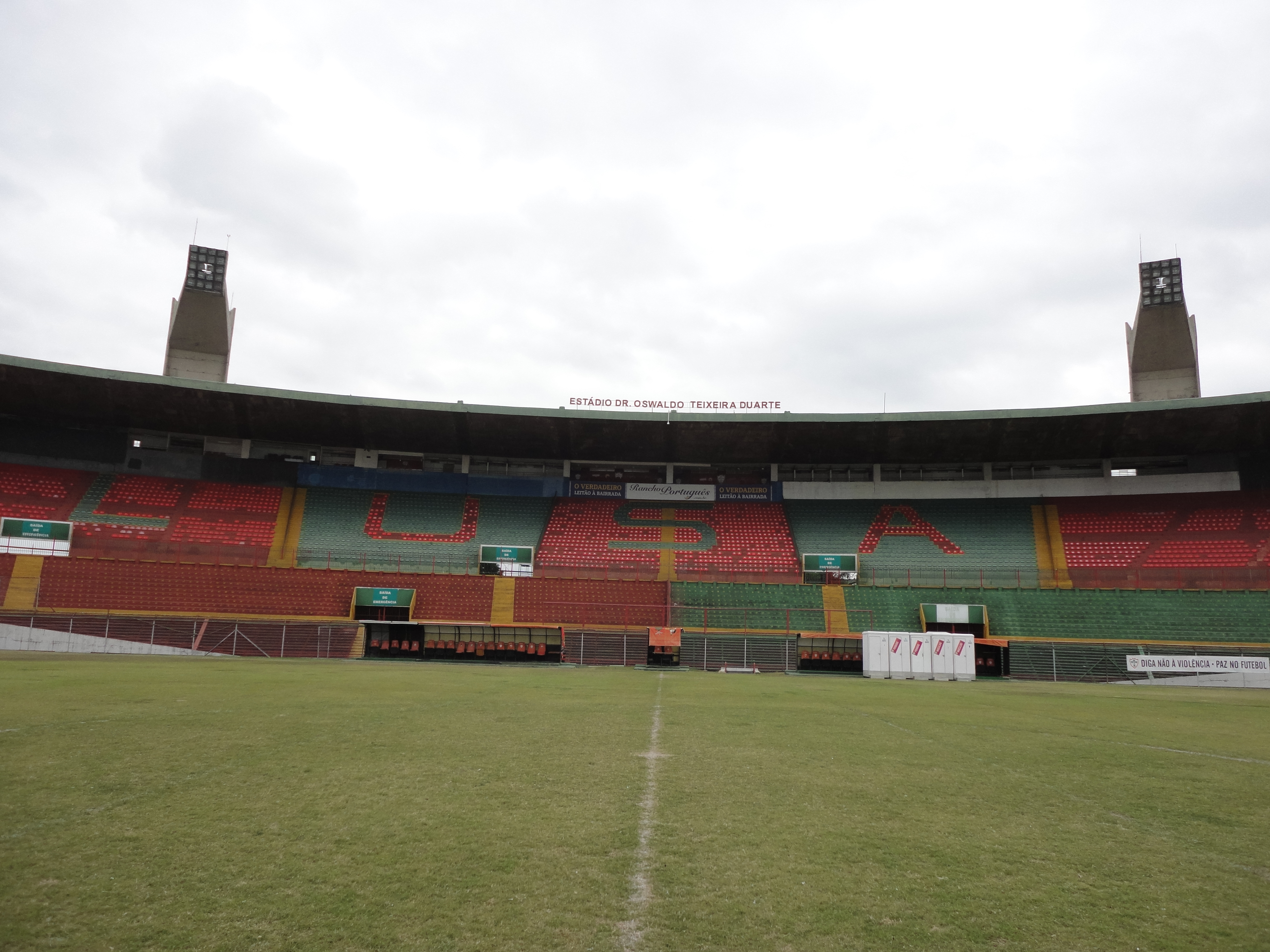 Vista do gramado do Canindé, em São Paulo, Brasil